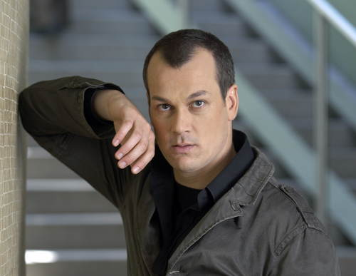 Matthias Klink, Tenor, 2008